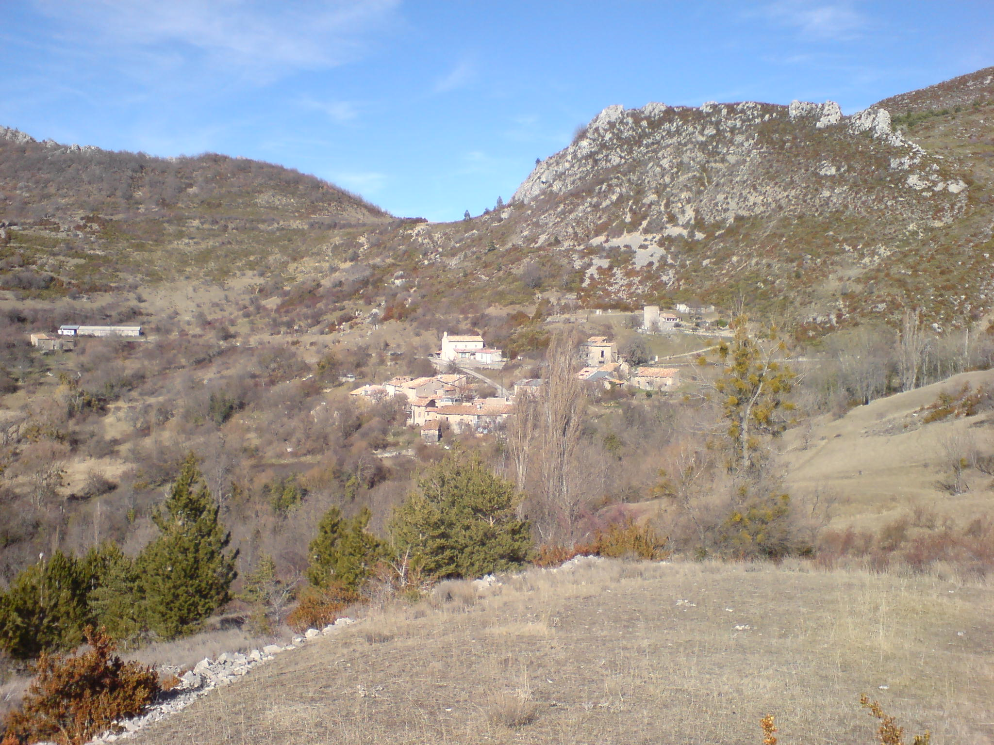 Description